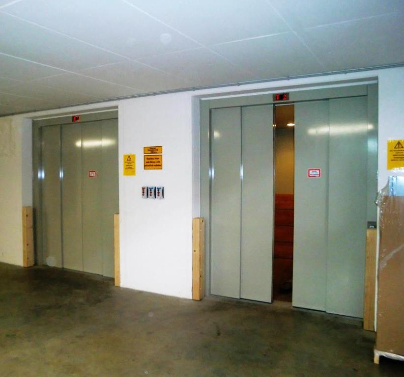 Schachtschiebetür